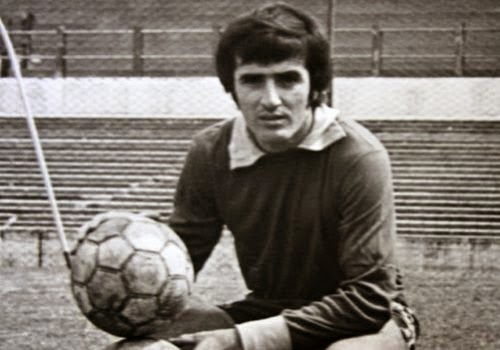 Eduardo Maglioni, con la camiseta del Club Atlético Independiente.